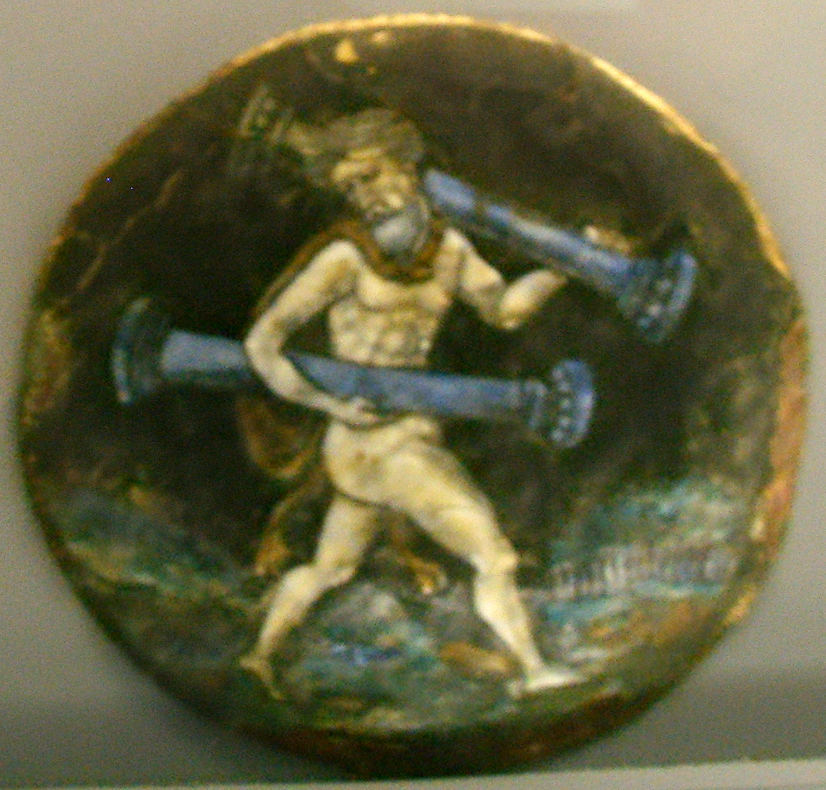 Cremona, museo civico, anonimo smaltatore limosino, ercole trasporta le leggendarie colonne, metà xvi secolo